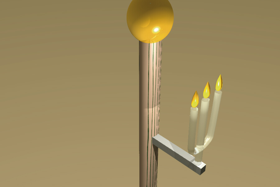 Hornstafur á rekkju Ólafs helga í Rauðúlfs þætti